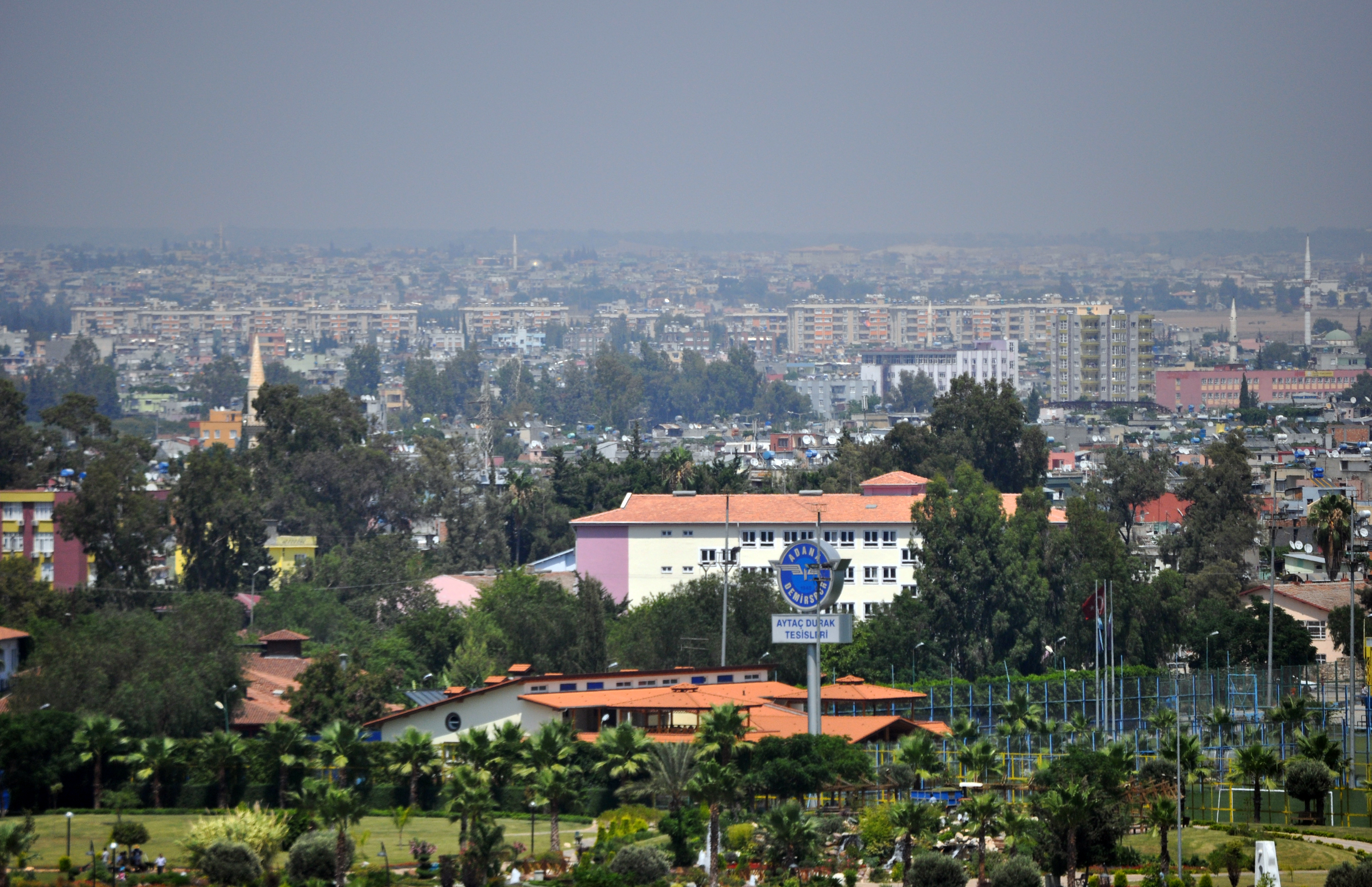 Adana Demirspor Tesisleri